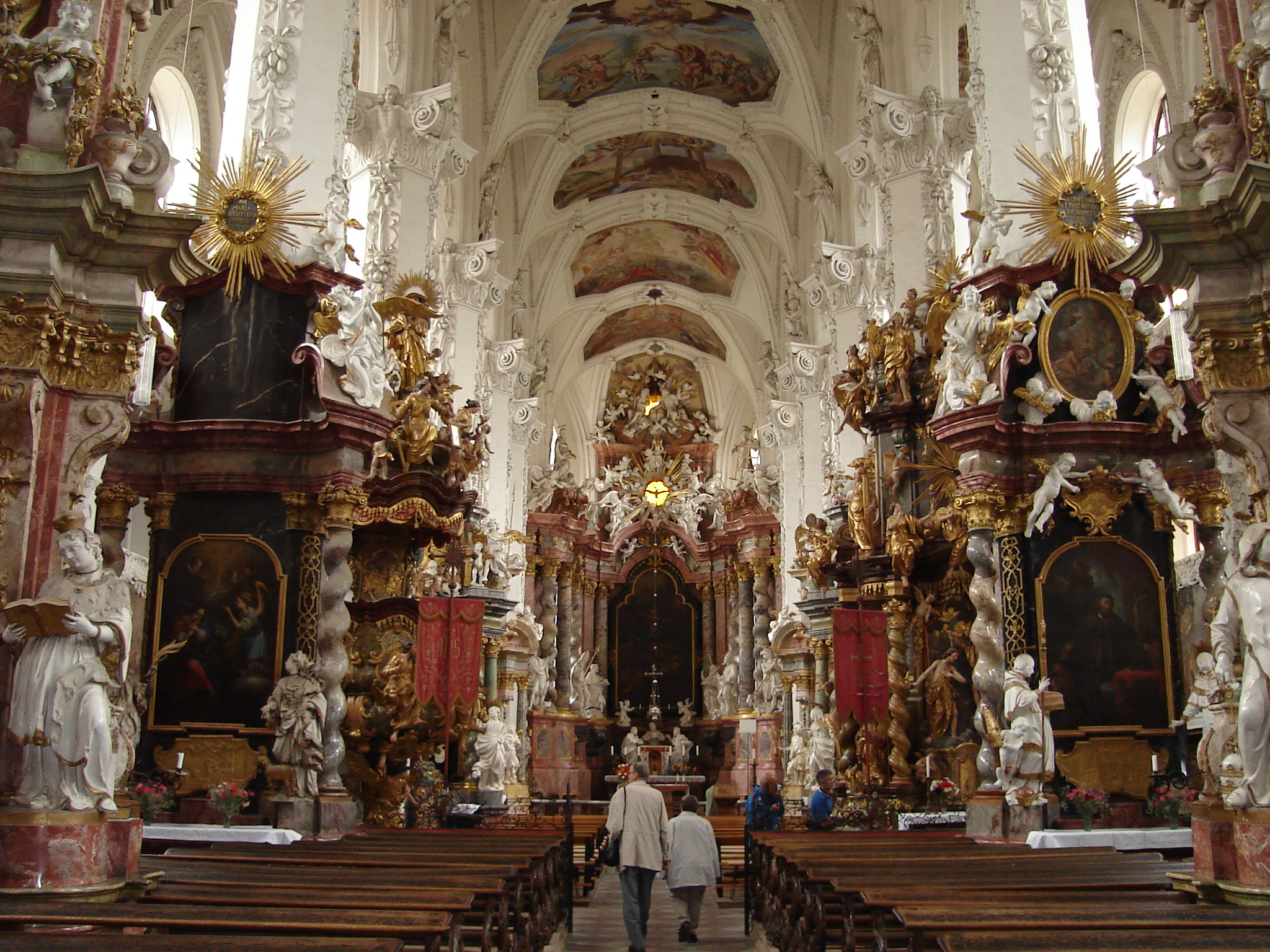 Kloster Neuzelle in Brandenburg, Blick Richtung Altar photo taken on July 9, 2005